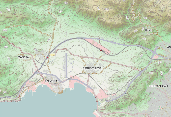 τοπογραφικός χάρτης Θριάσιου Πεδίου